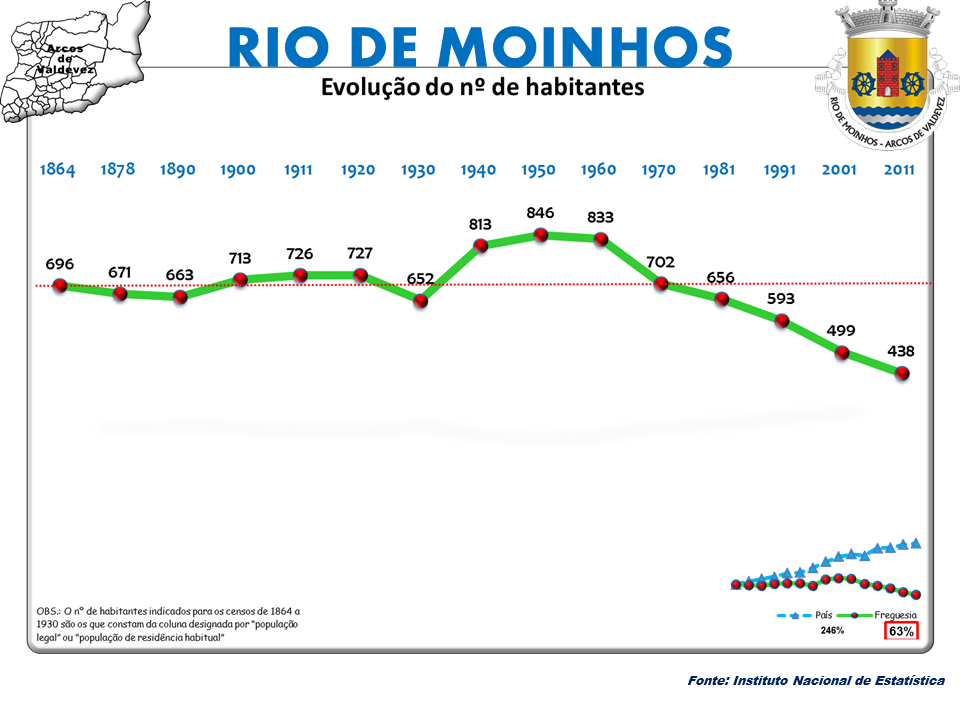 Censos 1864/2011